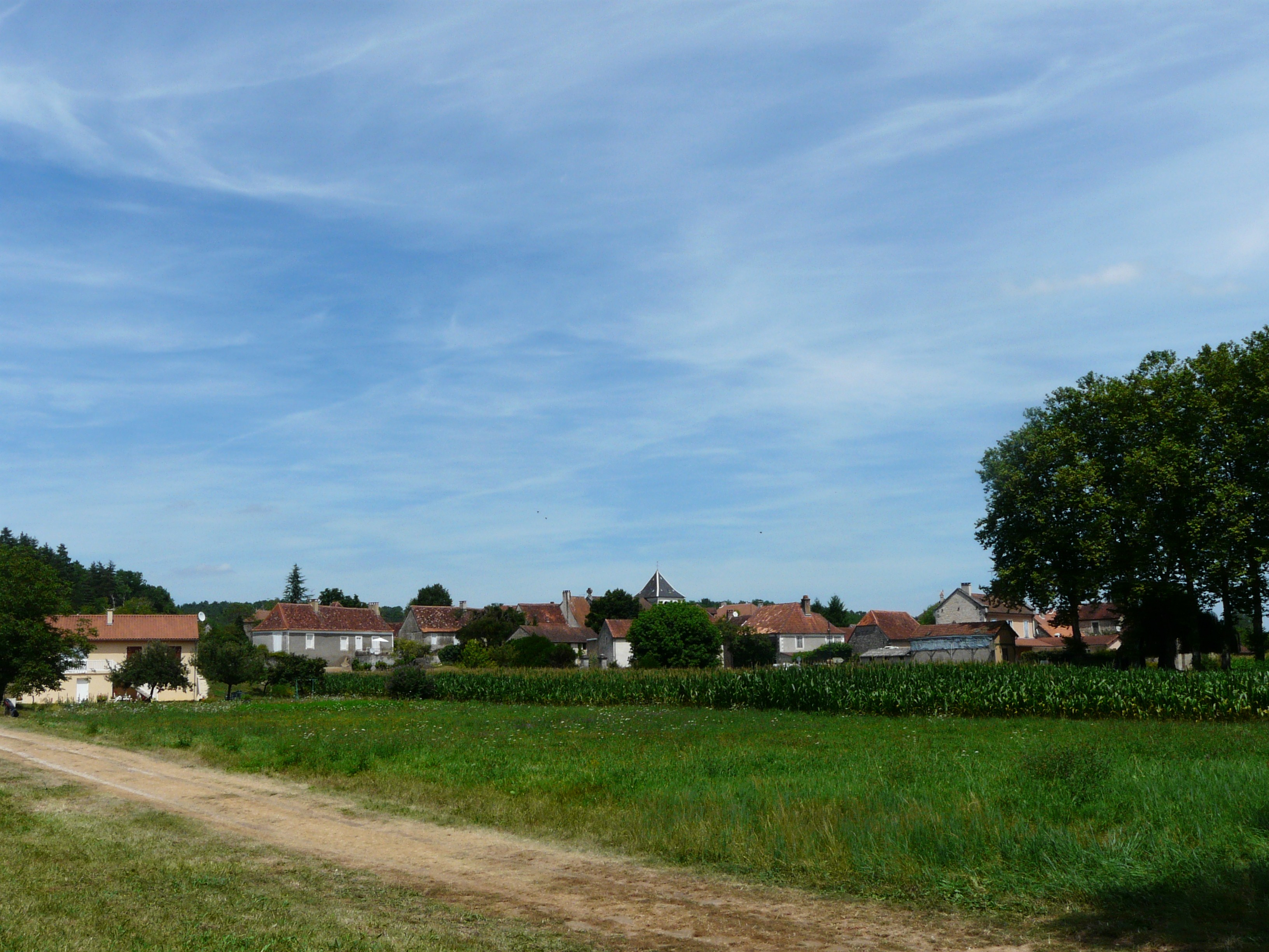 Le village de Saint-Pantaly-d'Ans, Dordogne, France.